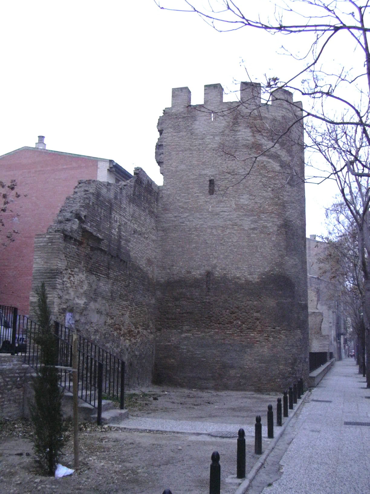 Zaragoza - Muralla Medieval